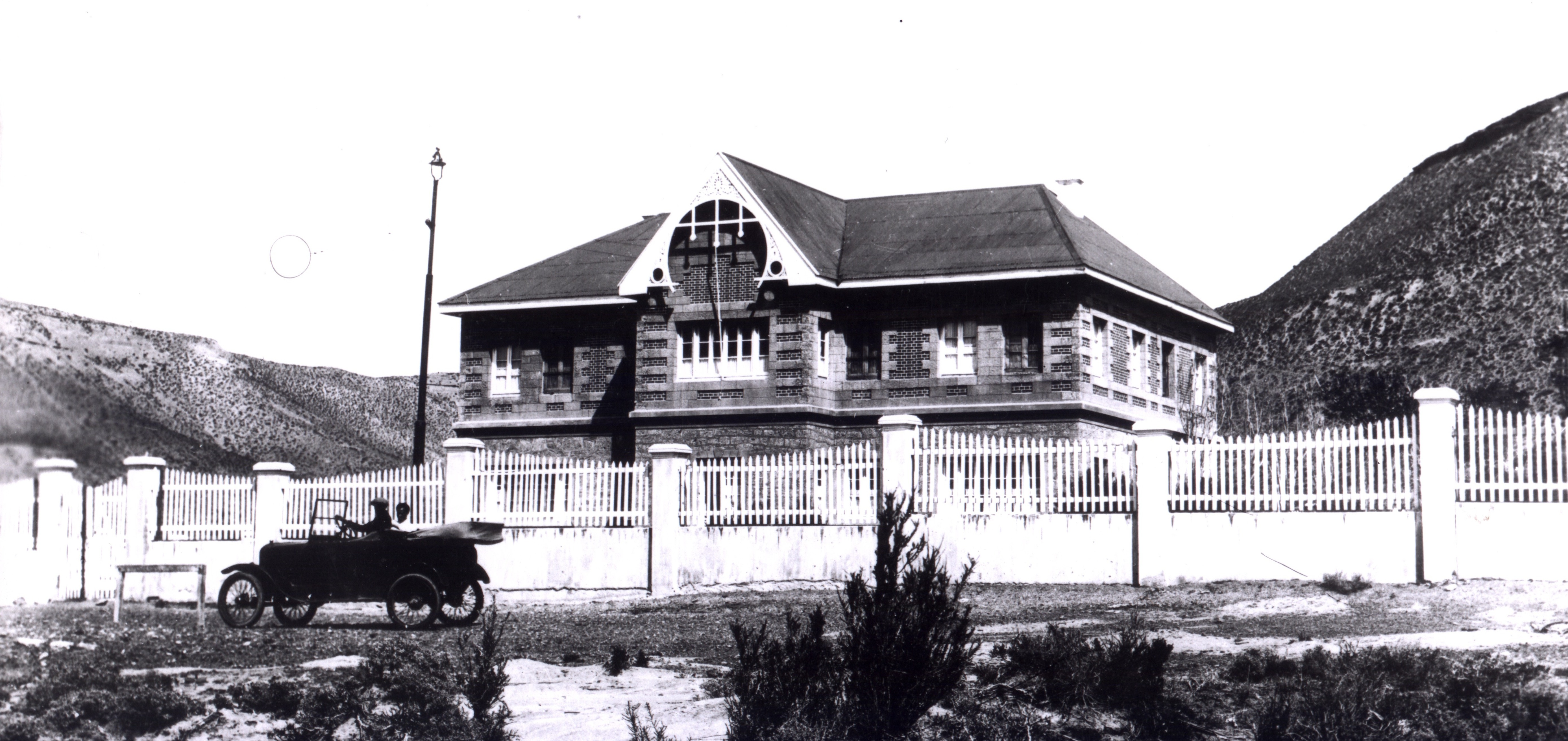 Esta fotografía fue tomada hacia 1924, en Comodoro Rivadavia. Se muestra la antigua fachada del Chalet Huergo, que en 1941 fue ampliada y modernizada. El fotógrafo que la tomó, del cual no existen datos, trabajaba para Yacimientos Petrolíferos Fiscales, ya que se trata de una fotografía oficial de la empresa.